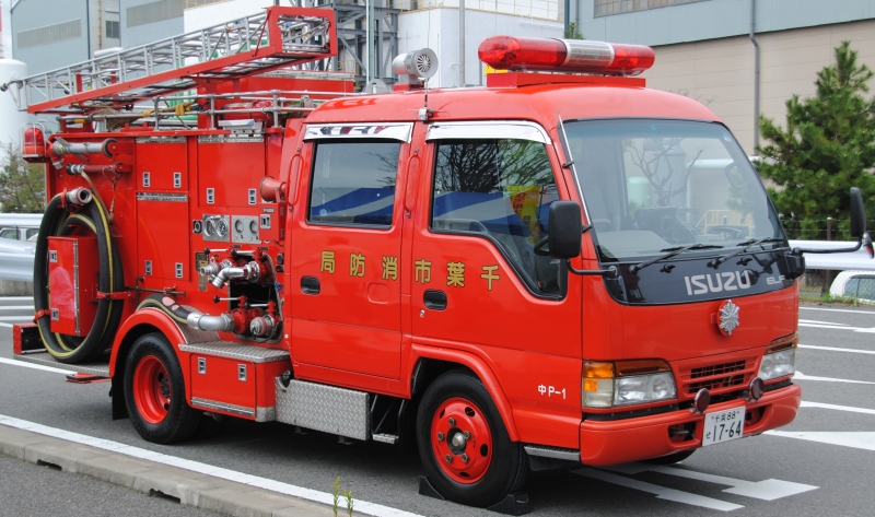 千葉市消防局のポンプ車